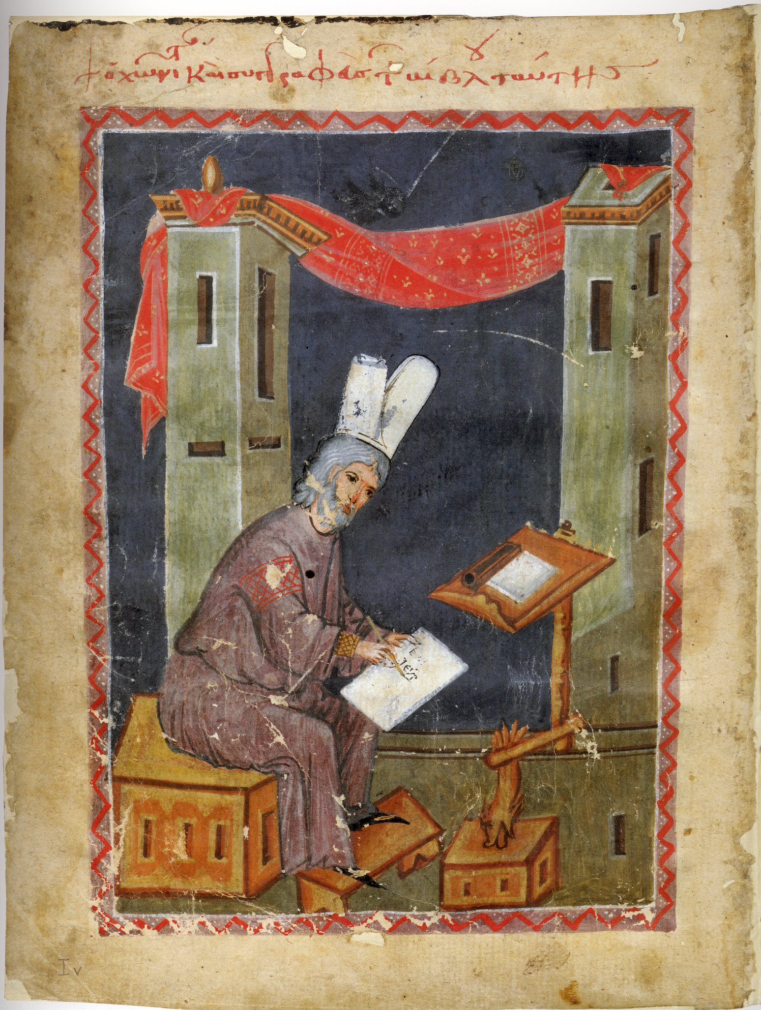 Niketas Choniates, Miniatur aus Niketas Choniates: Historia (Konstantinopel?, 14. Jh.), Wien, Österreichische Nationalbibliothek, Cod. Hist. gr. 53*, fol. 1v